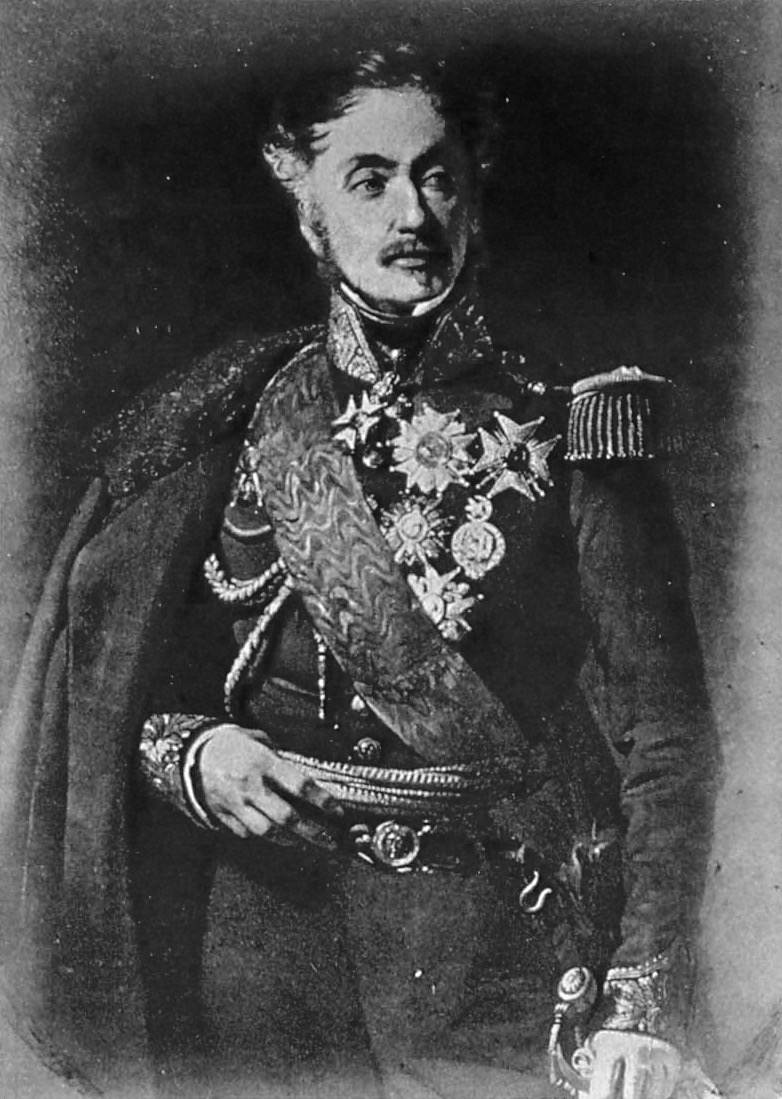 Louis Marie Jean Baptiste Atthalin, Biographies alsaciennes avec portraits en photographie, série 3